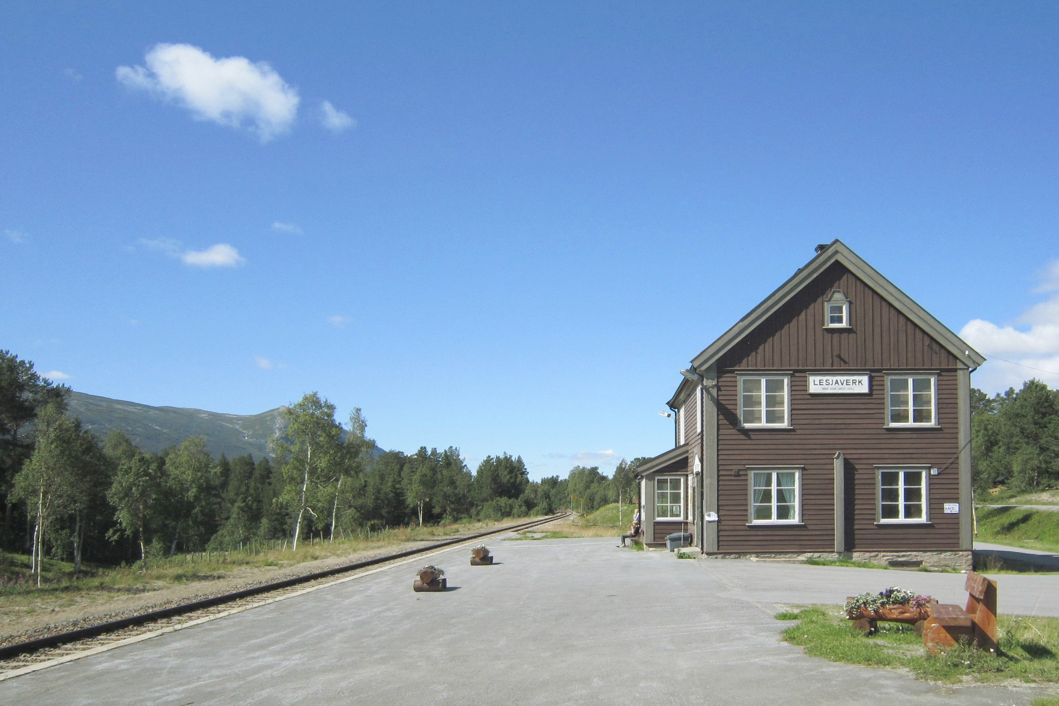 Lesjaverk stasjon på Raumabanen